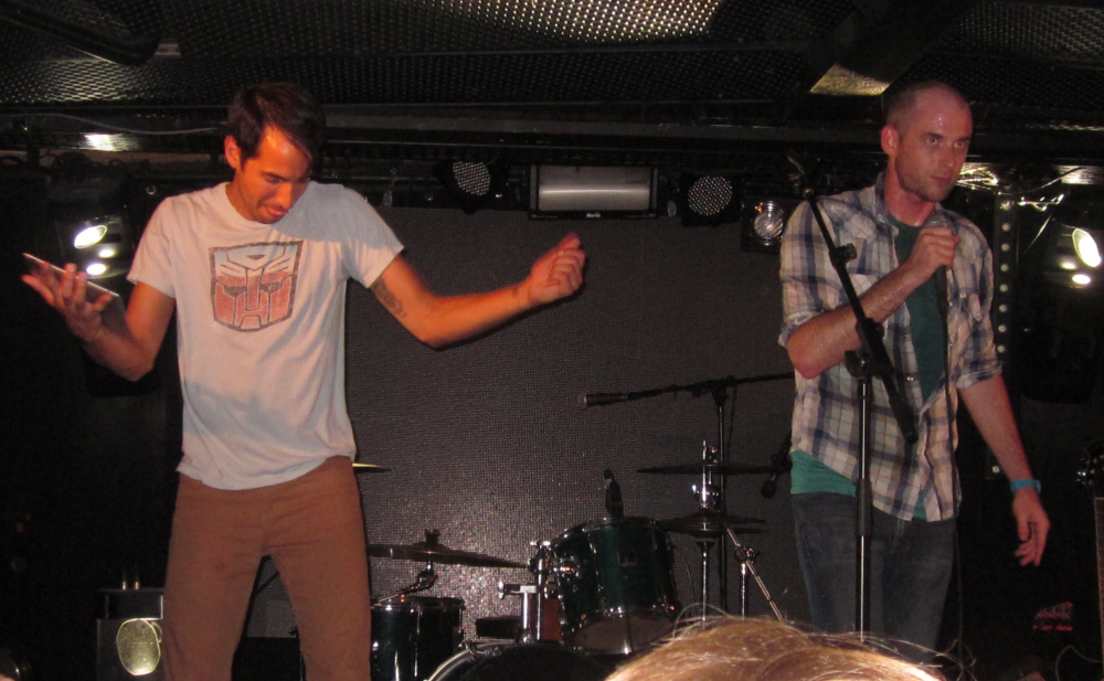 Nice Peter (à droite) en concert au Batofar, à Paris (14 juillet 2014). Dante Cimadamore (à gauche) l'accompagne à la batterie.